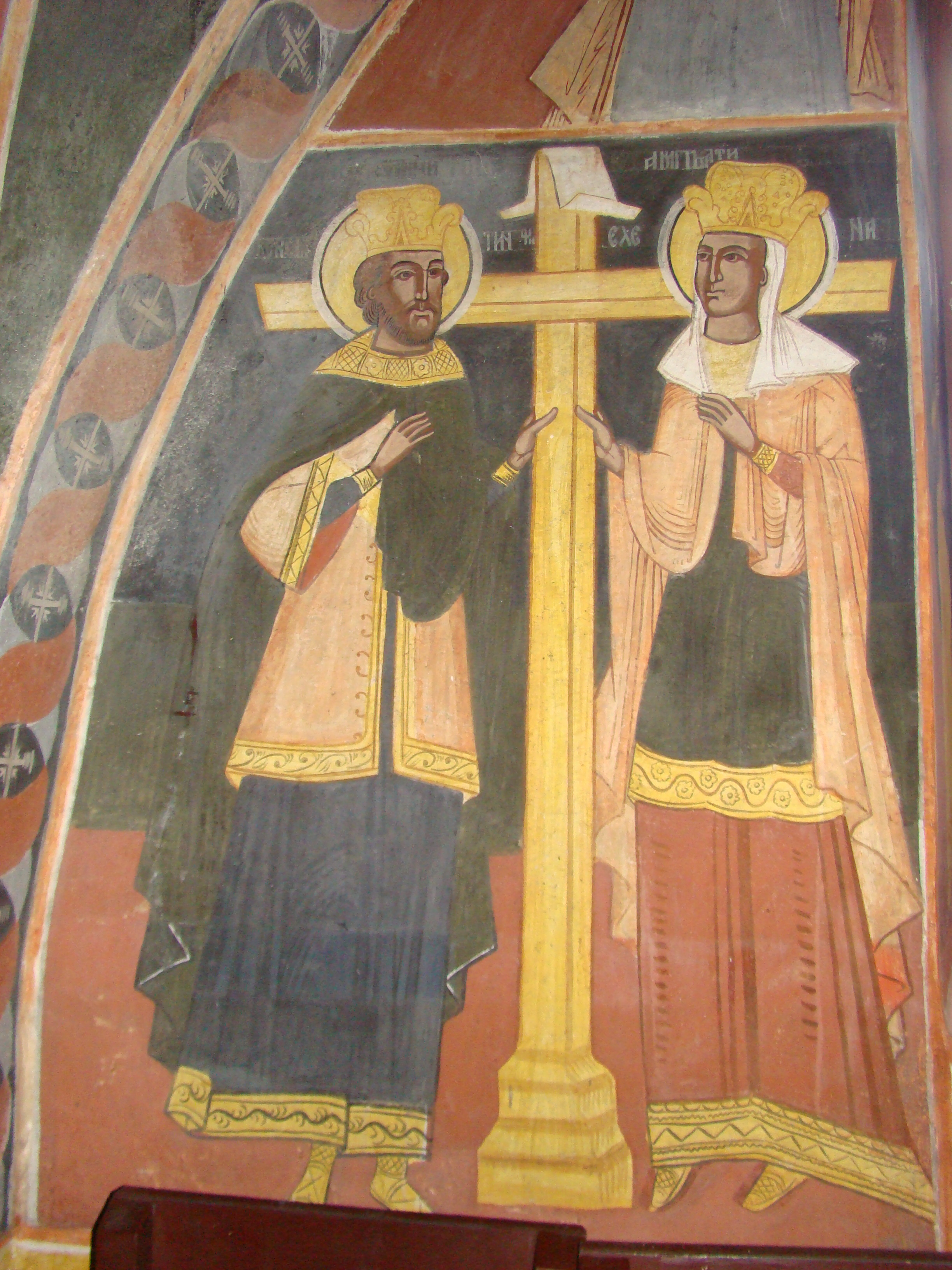 Biserica "Naşterea Domnului" , sat SĂRATA; comuna PORUMBACU DE JOS